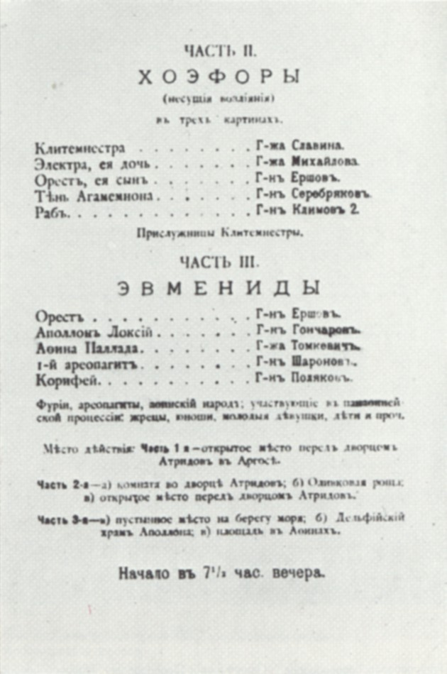 Программа премьеры "Орестеи" Танеева. Петербург, Мариинский театр, 17 октября 1895 года.